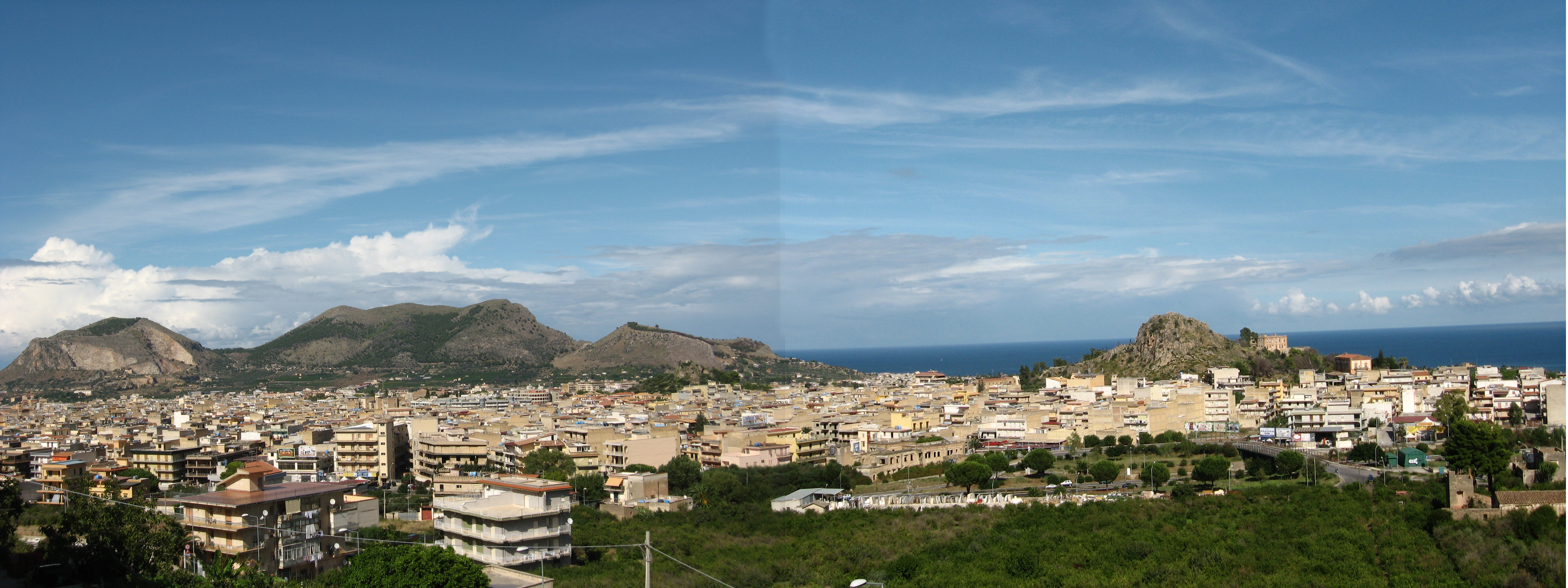 Foto di Bagheria